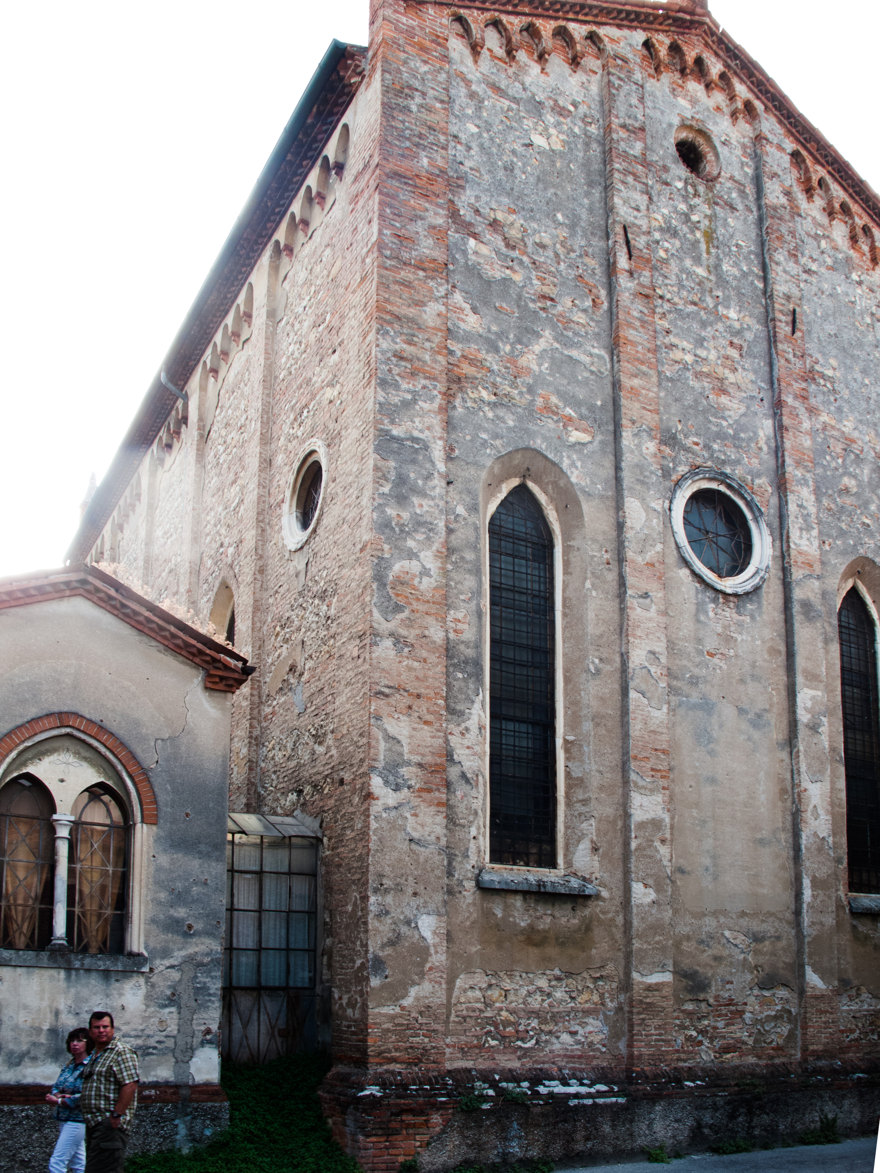 Esterno